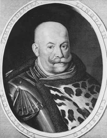 hetman wielki litewski Krzysztof Radziwiłł anonymous drawing from XVII century